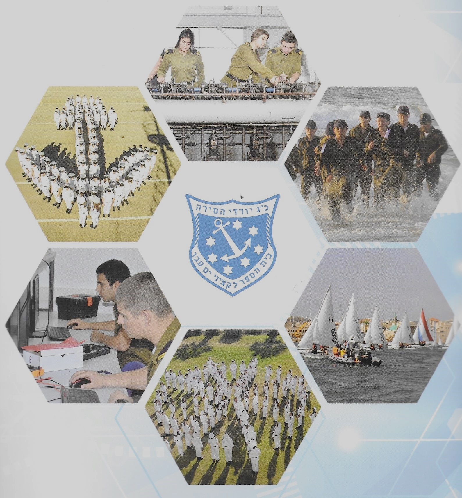 פרסום בית הספר קציני ים לשנת הלימודים תשע"ח